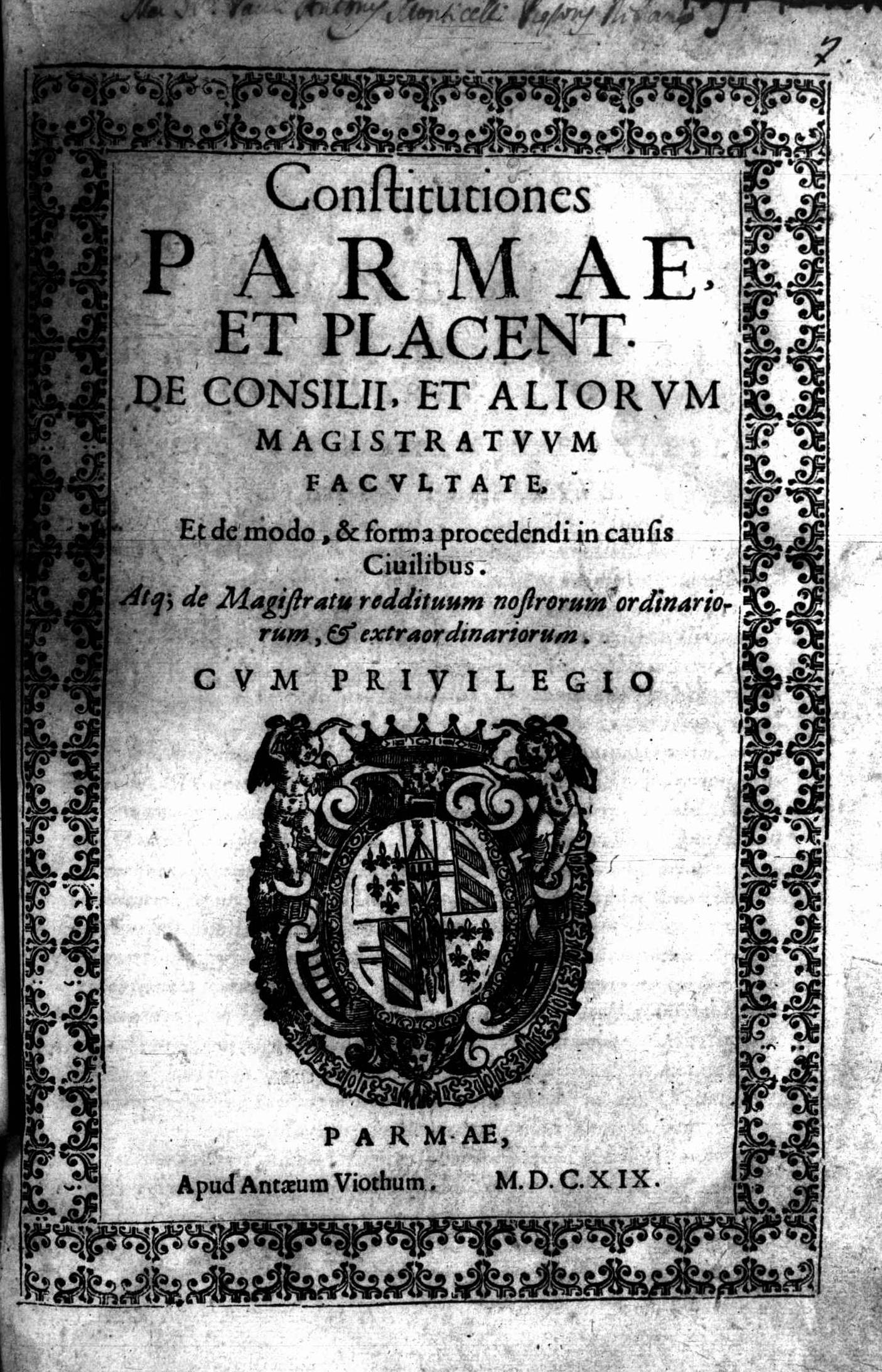 Frontespizio